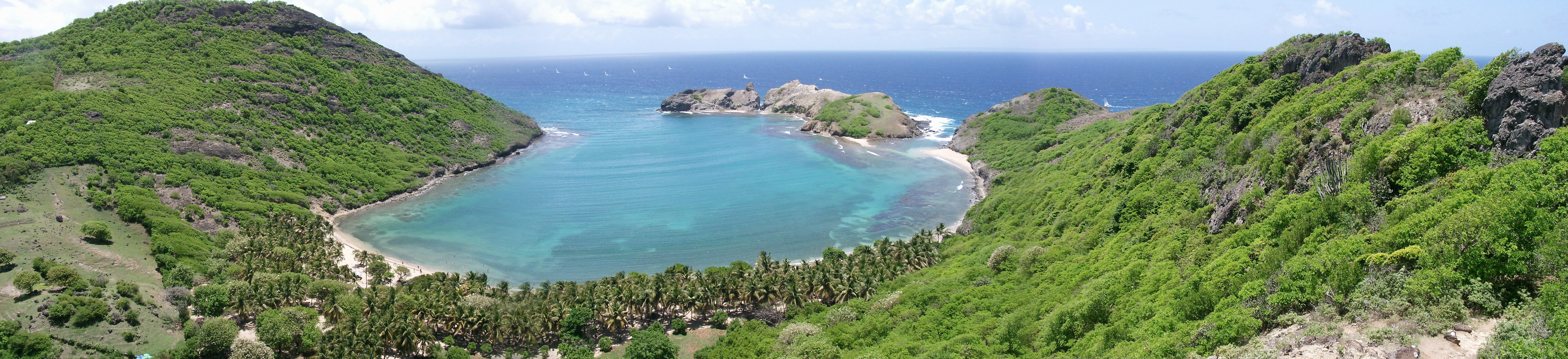 Les Saintes (Guadeloupe) : Pompierre